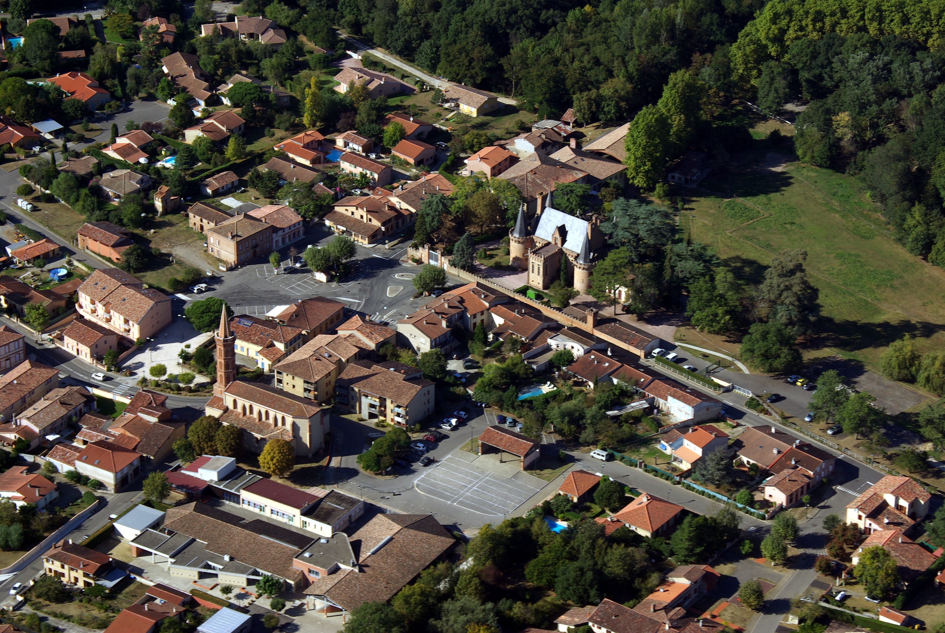 Vue aérienne de Brax, de son église et de son château.